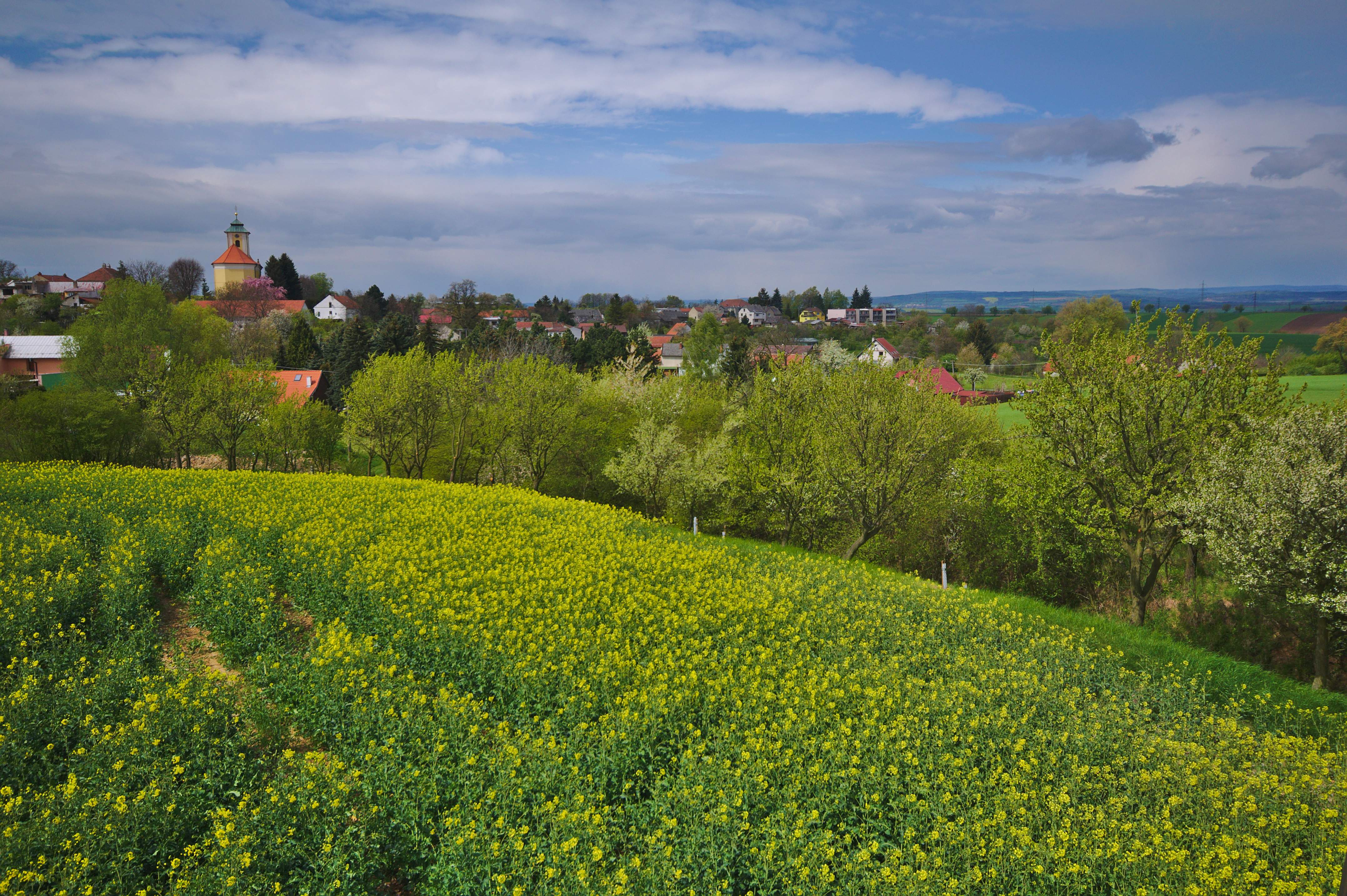 Pohled na obec od východu, Pavlovice u Kojetína, okres Prostějov